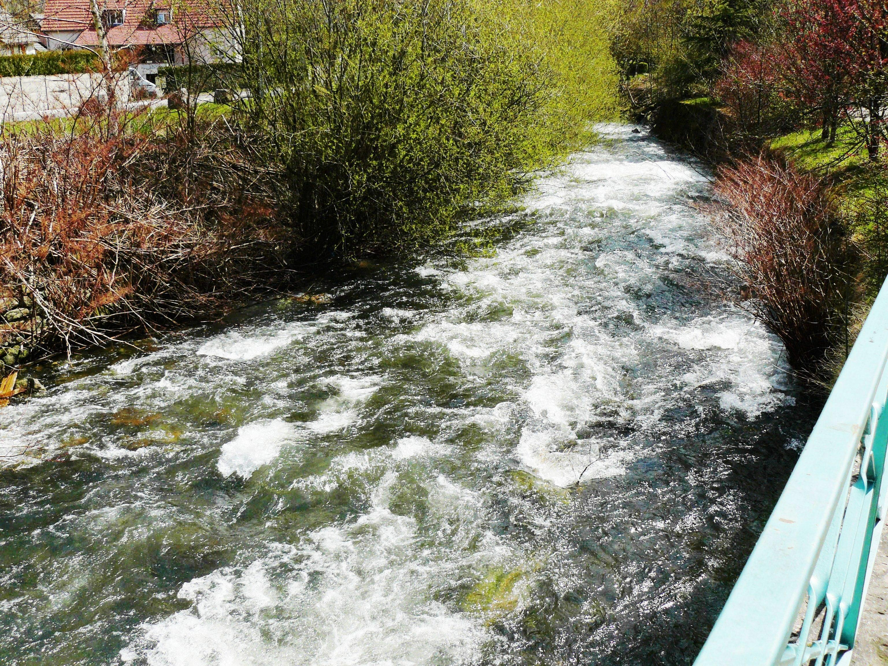 La Lauch à Lautenbach (Haut-Rhin)